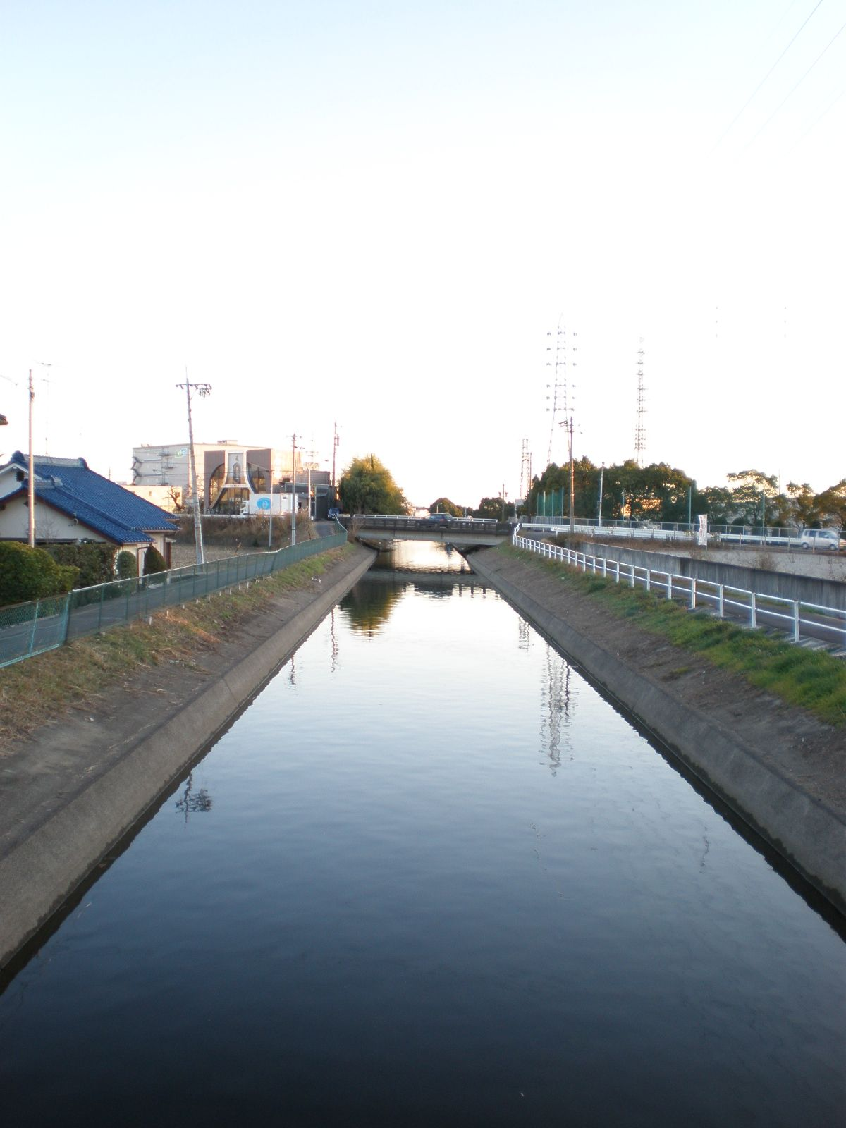 尾張北部を流れる新木津用水（撮影場所：愛知県小牧市大字二重堀）